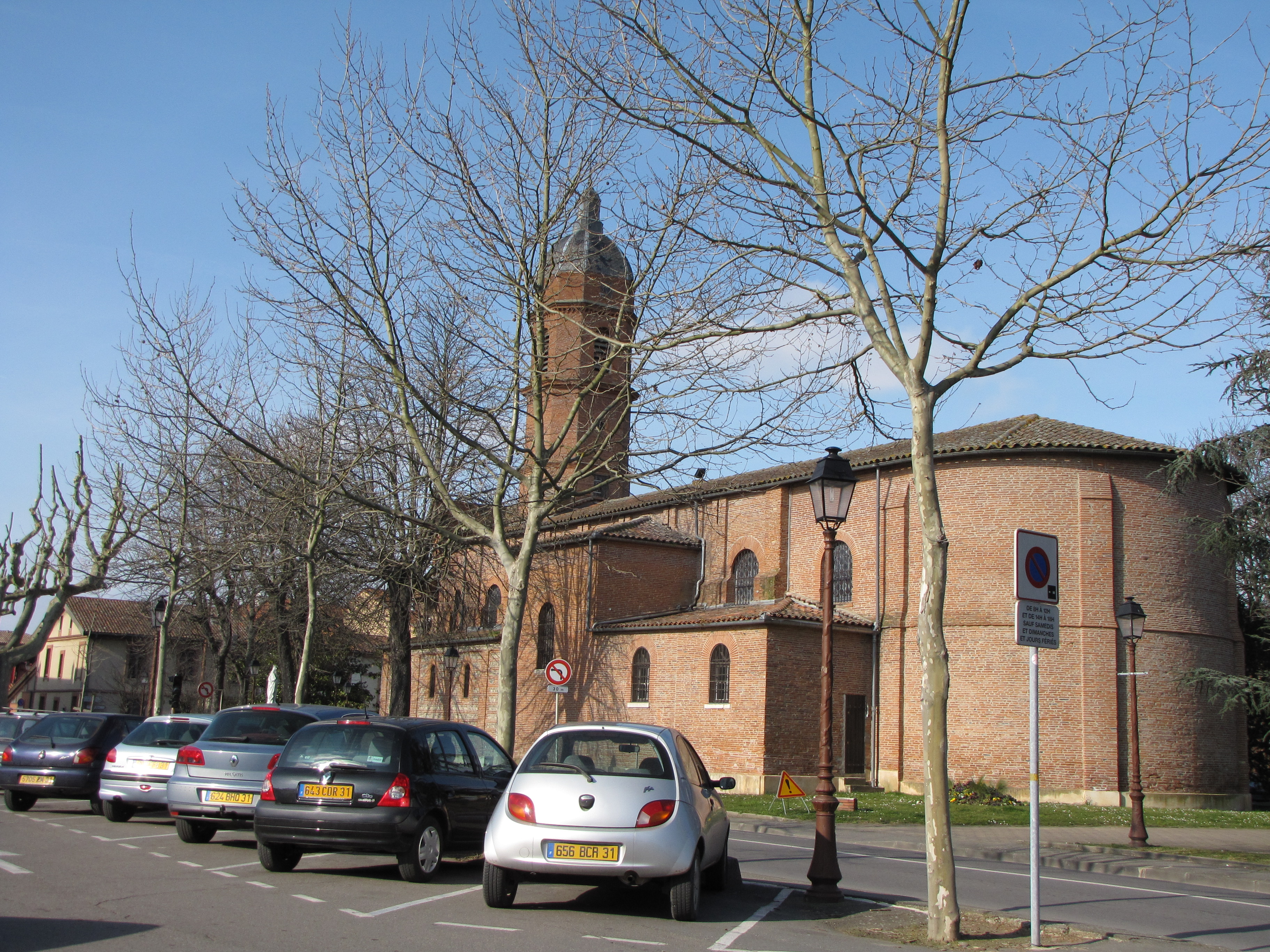 Église de Cugnaux (Haute-Garonne, France).